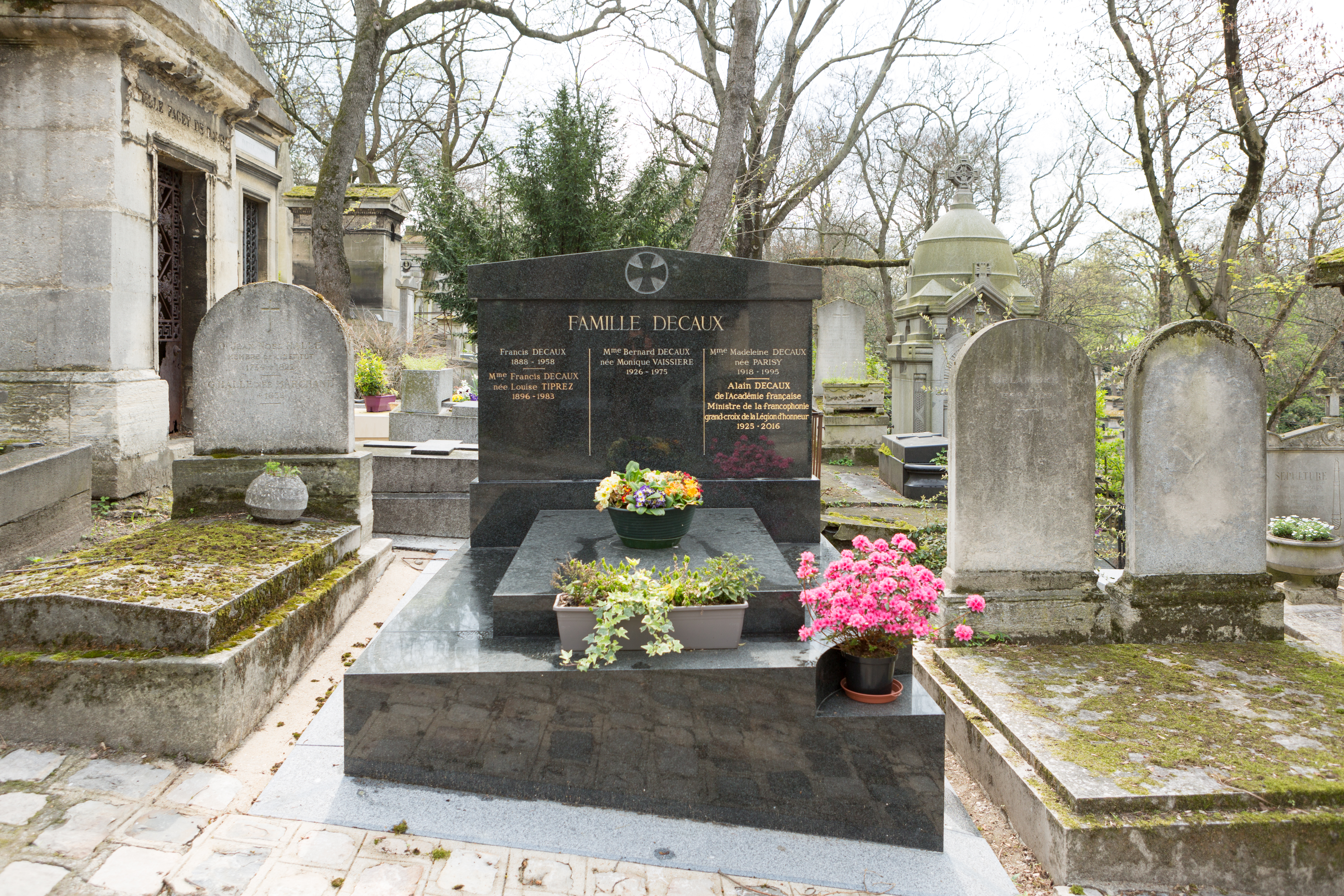 Sépulture d'Alain Decaux (1925-2016), écrivain, biographe, homme de télévision et de radio et académicien français. Il a occupé le devant de la scène médiatique pendant près d'un demi-siècle avec ses émissions de vulgarisation historique et ses nombreuses publications. Autres occupants : Francis Decaux (1888-1958), père d'Alain Decaux, avocat et bâtonnier du barreau de Lille ; Louise Tiprez (1896-1983), mère d'Alain Decaux ; Paul Tiprez et Louise Constant, grand parents maternels d'Alain Decaux ; Madeleine Parisy (1918-1995), première femme d'Alain Decaux.